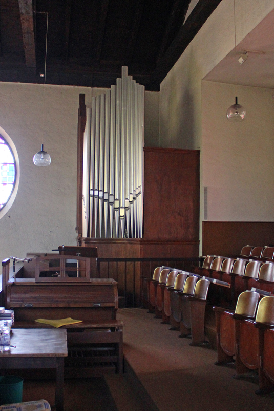 Blick ins Innere der katholischen Pfarrkirche St. Agatha in Merchingen, einem Stadtteil von Merzig, Landkreis Merzig-Wadern, Saarland.